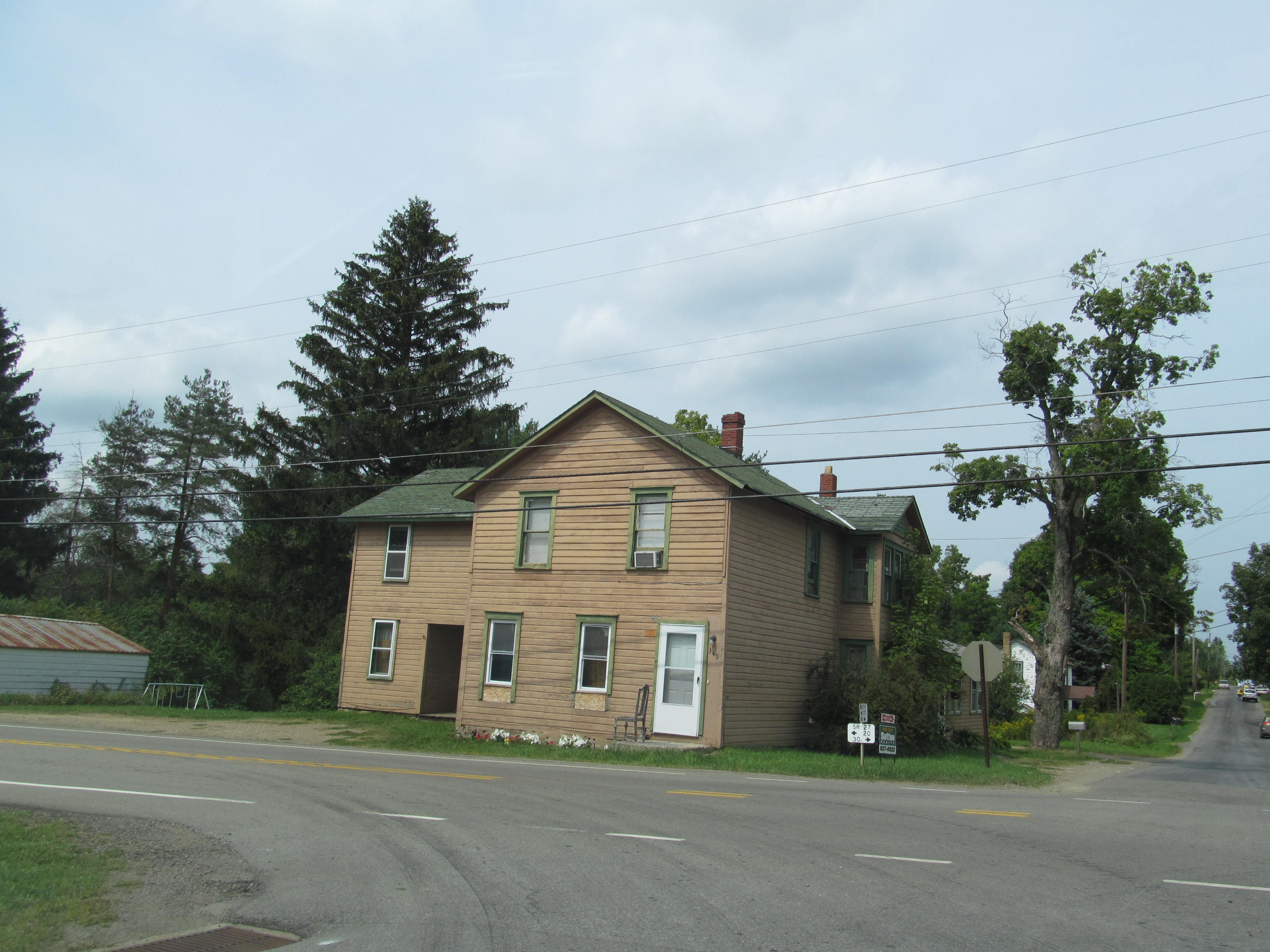 Chapmanville, Pennsylvania